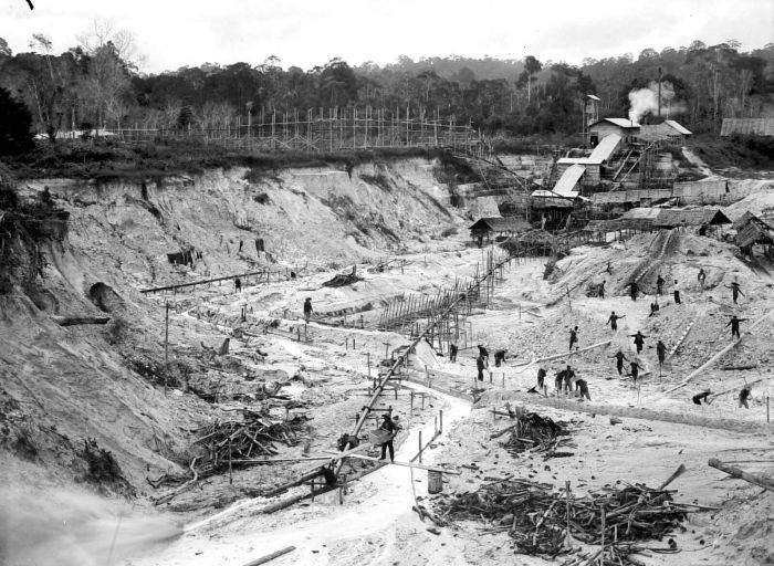 Negatief. Van de drie tineilanden Banka, Billiton en Singkep had Banka in 1938 de grootste productie (15.564 ton) en Singkep de kleinste (1.655). Billiton zat daar met 10.501 ton tussenin. Op Singkep was sedert 1889 de Singkep Tin Maatschappij werkzaam. Deze onderneming besloot in 1933 tot algehele overdracht van het bedrijf aan de Gemeenschappelijke Mijnbouwmaatschappij Billiton, een in 1924 aangegane joint venture van het Gouvernement en de Billiton Mij. Ook op het kleine Singkep vond technologische vernieuwing plaats met de, op de foto afgebeelde, hydraulische ontginning als resultaat. Wel moest de ertsgrondlaag nog door koelies worden afgegraven. (P. Boomgaard, 2001). Koelies graven de ertsgrondlaag af in de groeve Ajer Poetih, Singkep Tin Maatschappij, Riouw